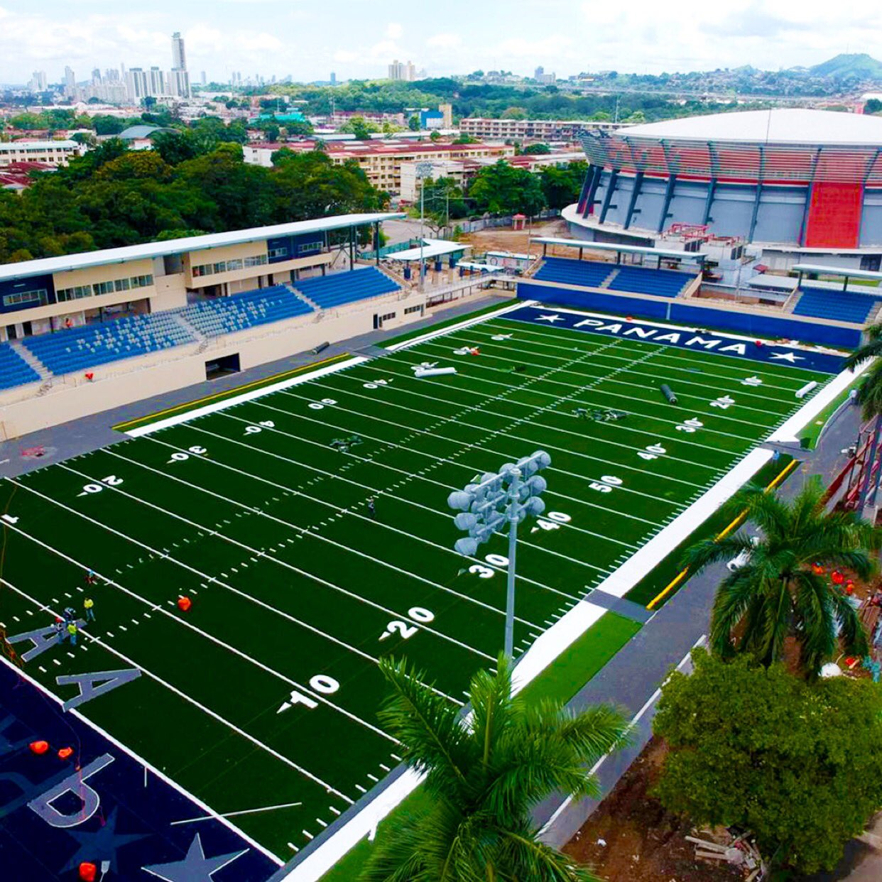 estadio de futbol americano